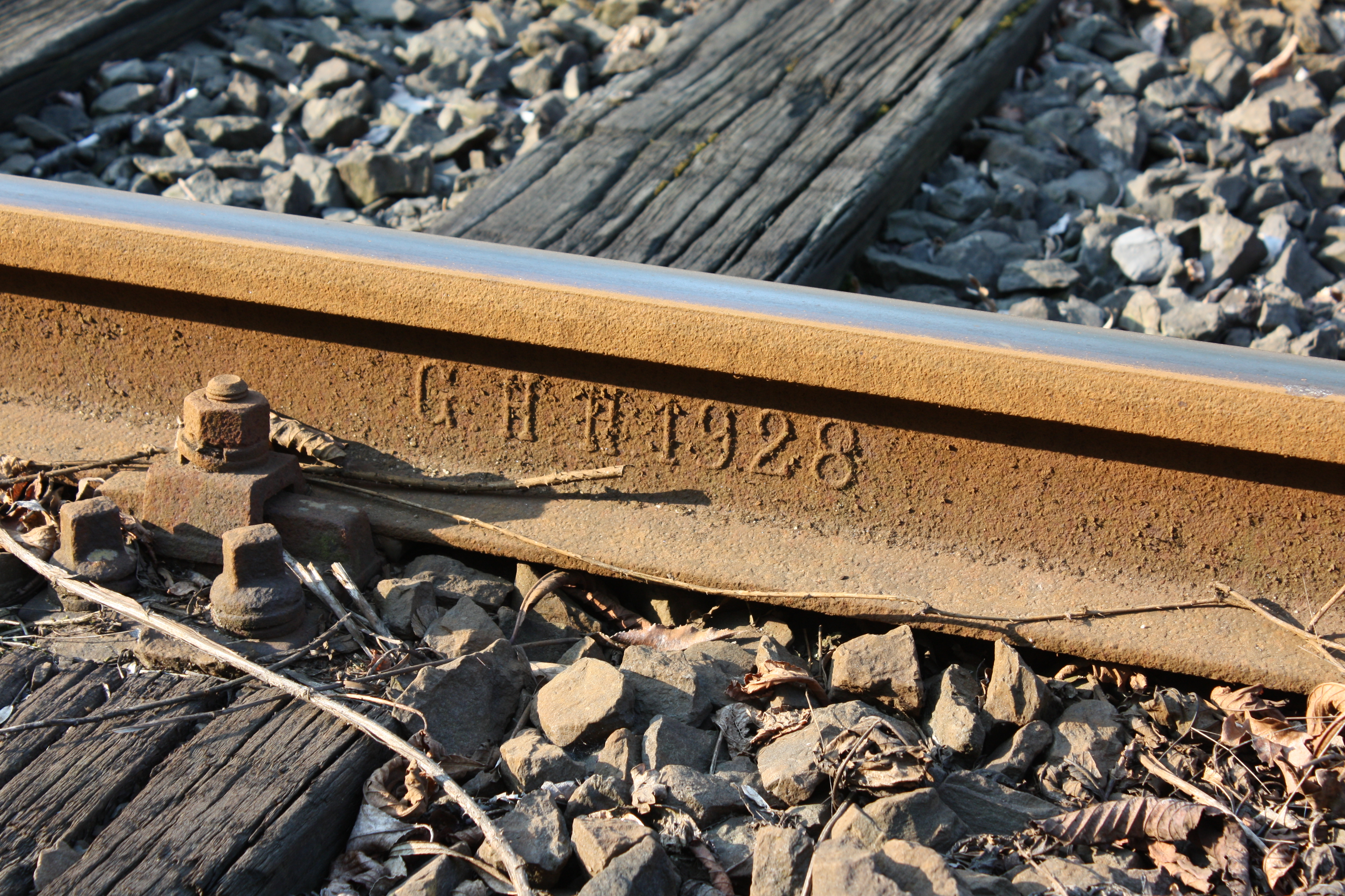 Gleisinschrift am Bahnhof Sennestadt